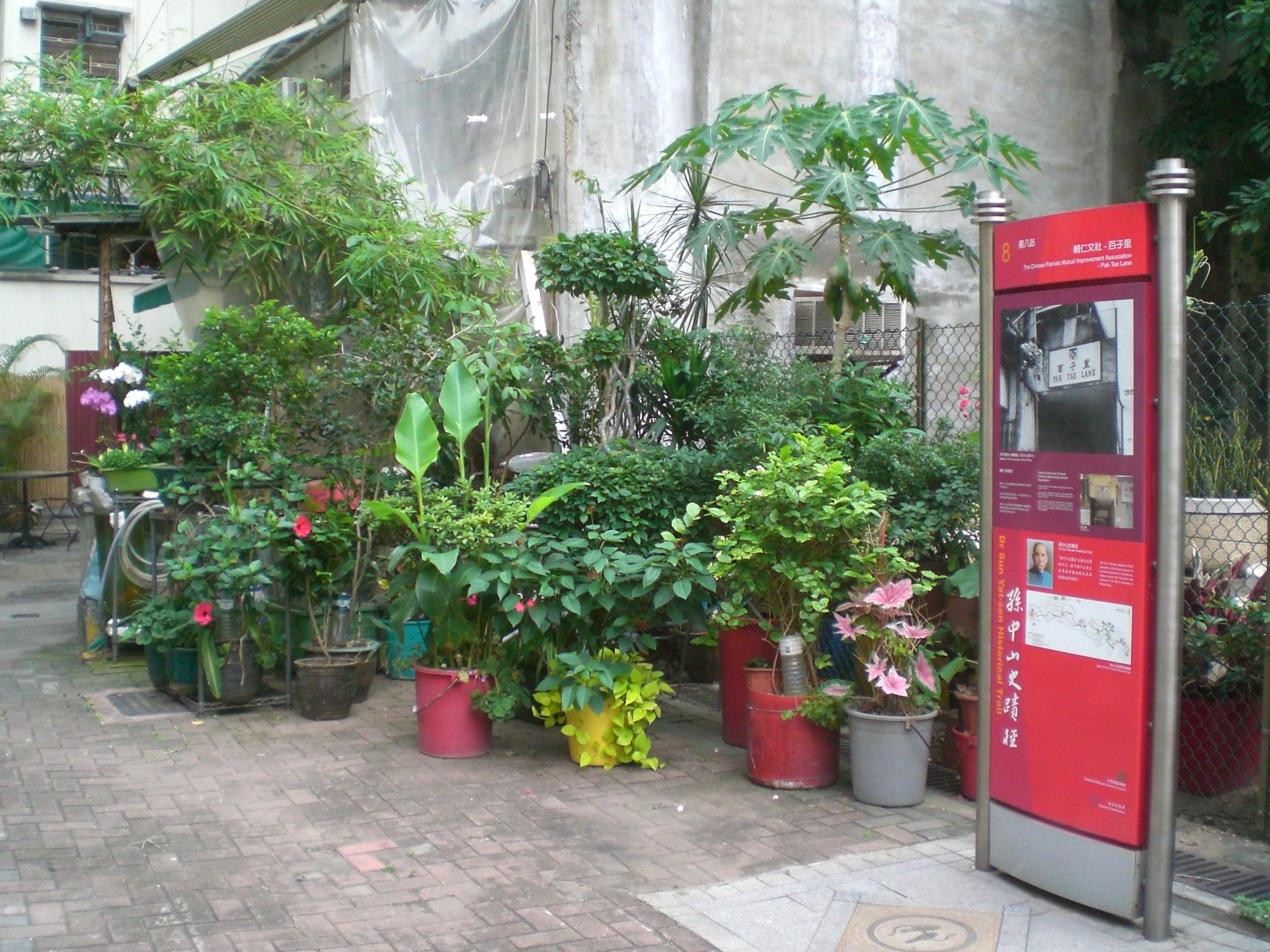 中環zh:百子里近鴨巴甸街與結志街之間